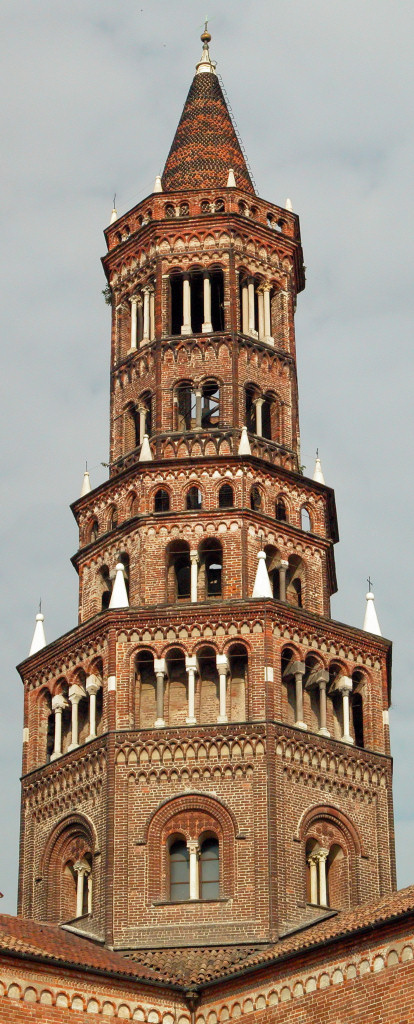 La "Ciribiciaccola", la torre campanaria dell'Abbazia di Chiaravalle a Milano. Foto da me realizzata.